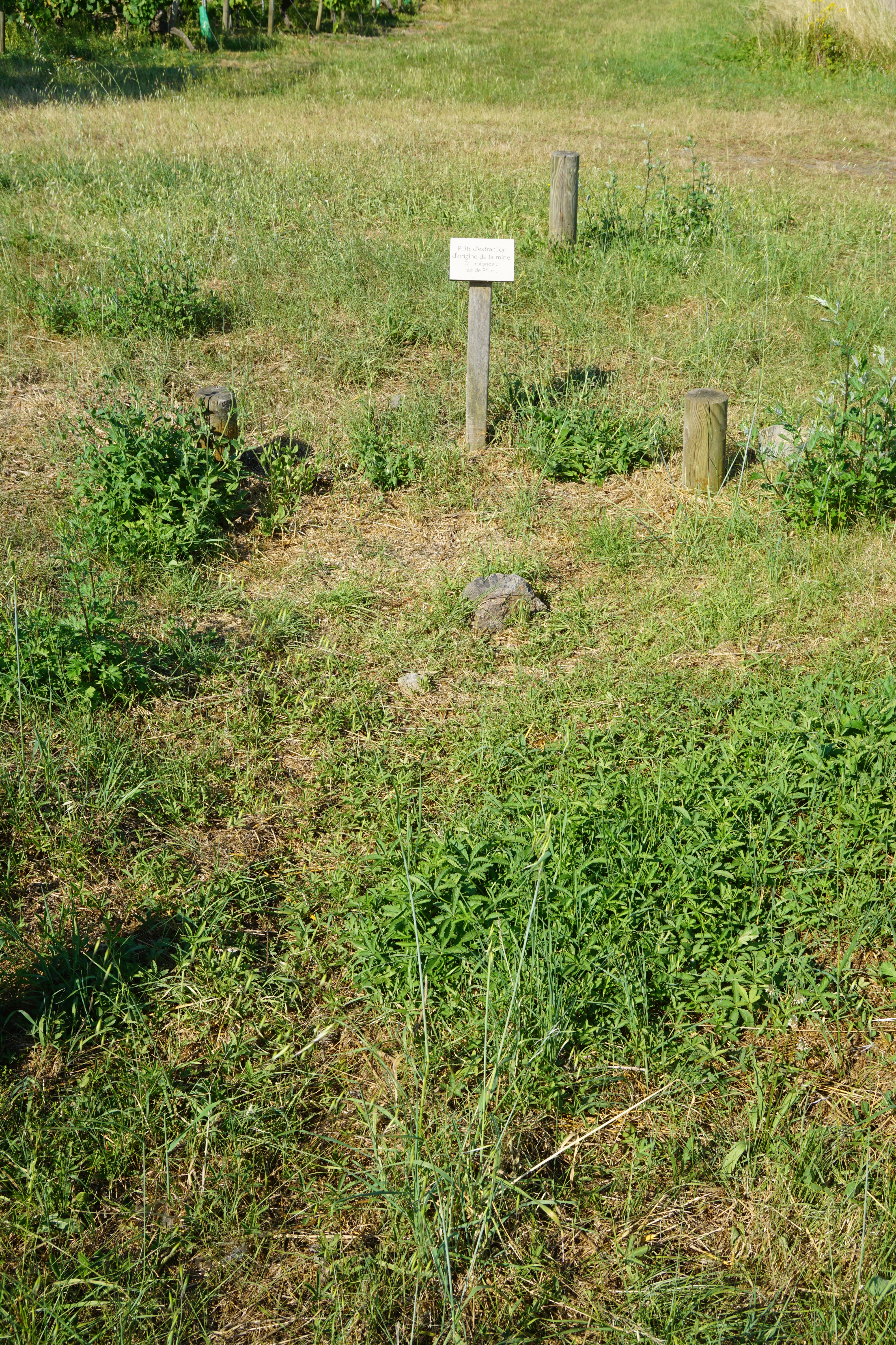 Emplacement du puits d'extraction du site des Malécots, mine de charbon du XXe siècle restaurée avec un chevalement en bois restauré.